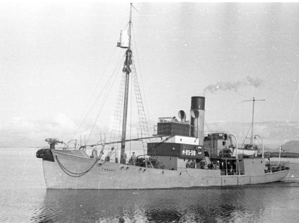 M.85.SØ Torgny. (Filmbeholder 19953b)